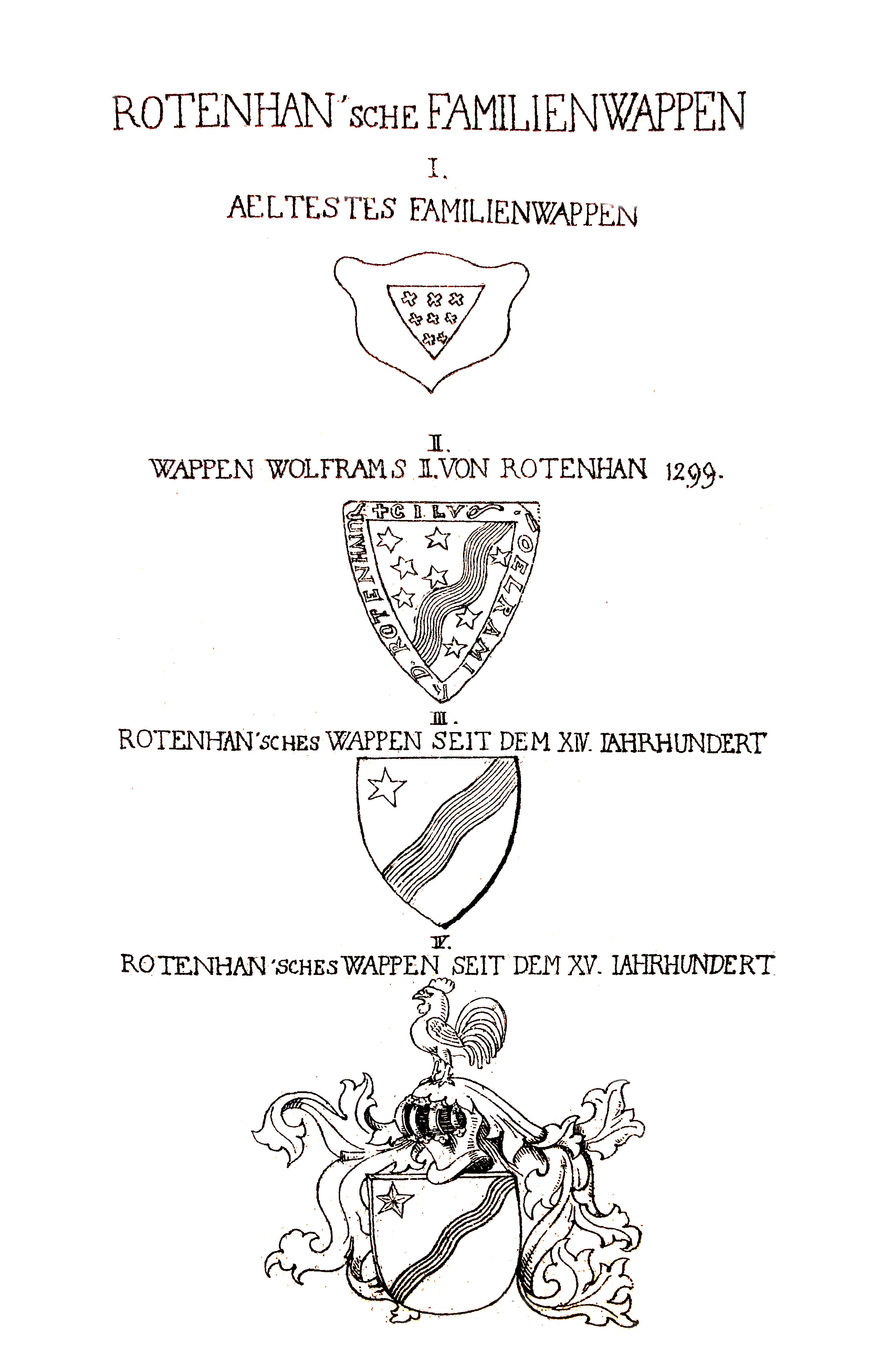 Entwicklung des Wappens der Familie von Rotenhan